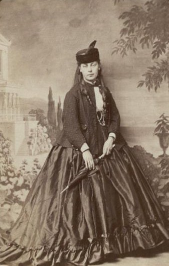 Александра Васильевна Жуковская, в замужестве баронесса Верман (1842—1899)